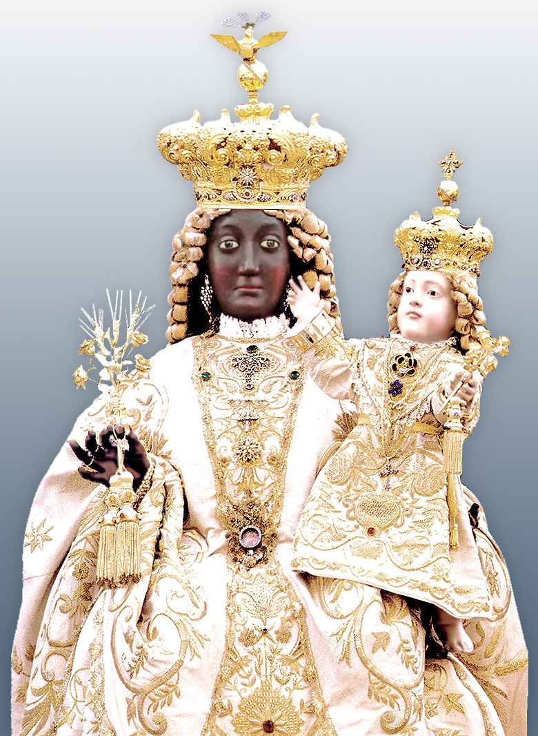 San Severo: la statua della Madonna del Soccorso. Elaborazione di Tobia Gorrio (2006) Categoria:San Severo